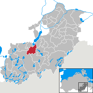 Blumenholz in Mecklenburg-Vorpommern, Landkreis Mecklenburg-Strelitz